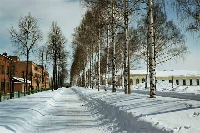 Rue au centre d'Izhevsk près de l'ancien arsenal.